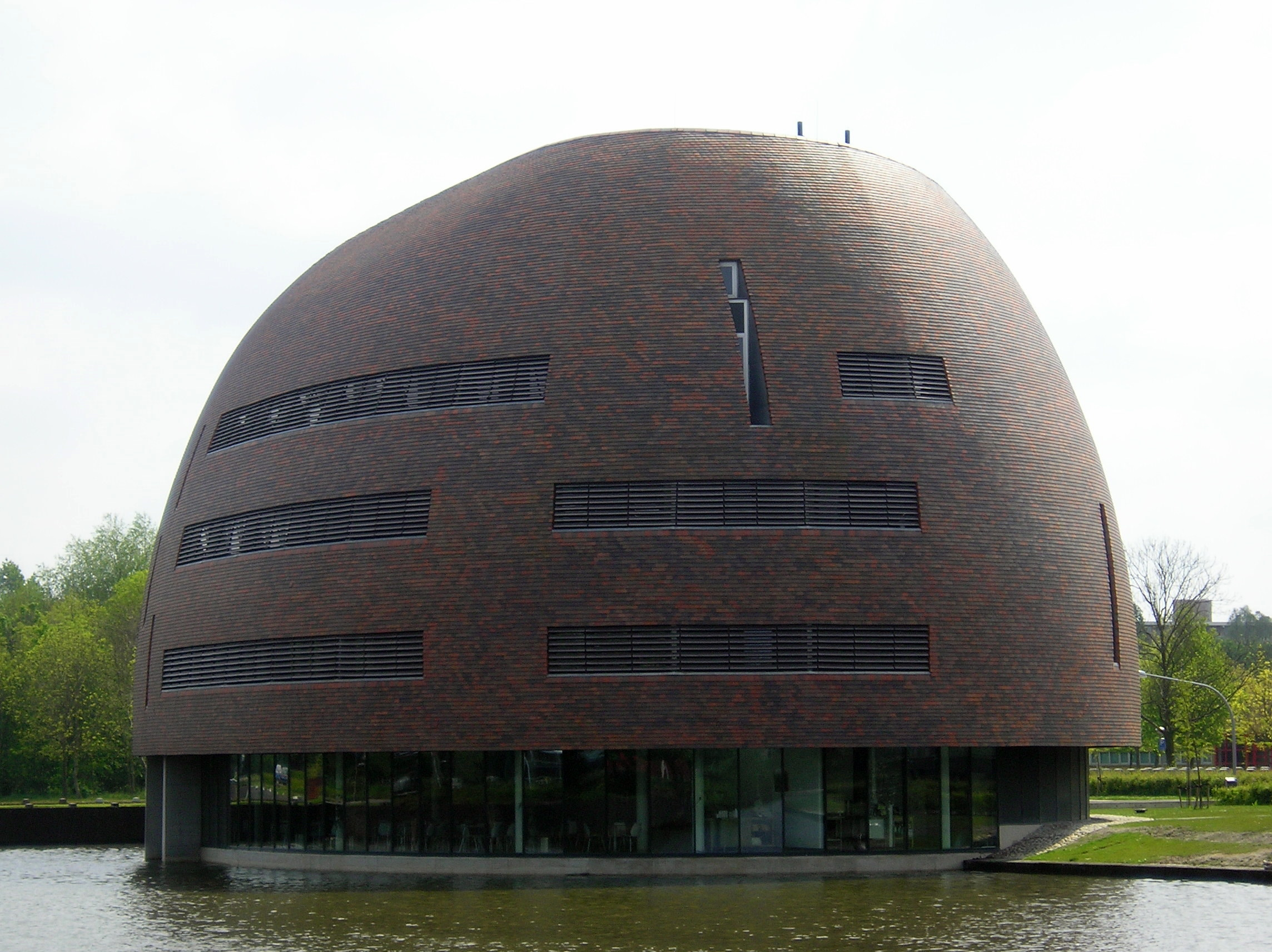 Zernikeborg is het ICT-infrastructureel knooppunt van Noord-Nederland